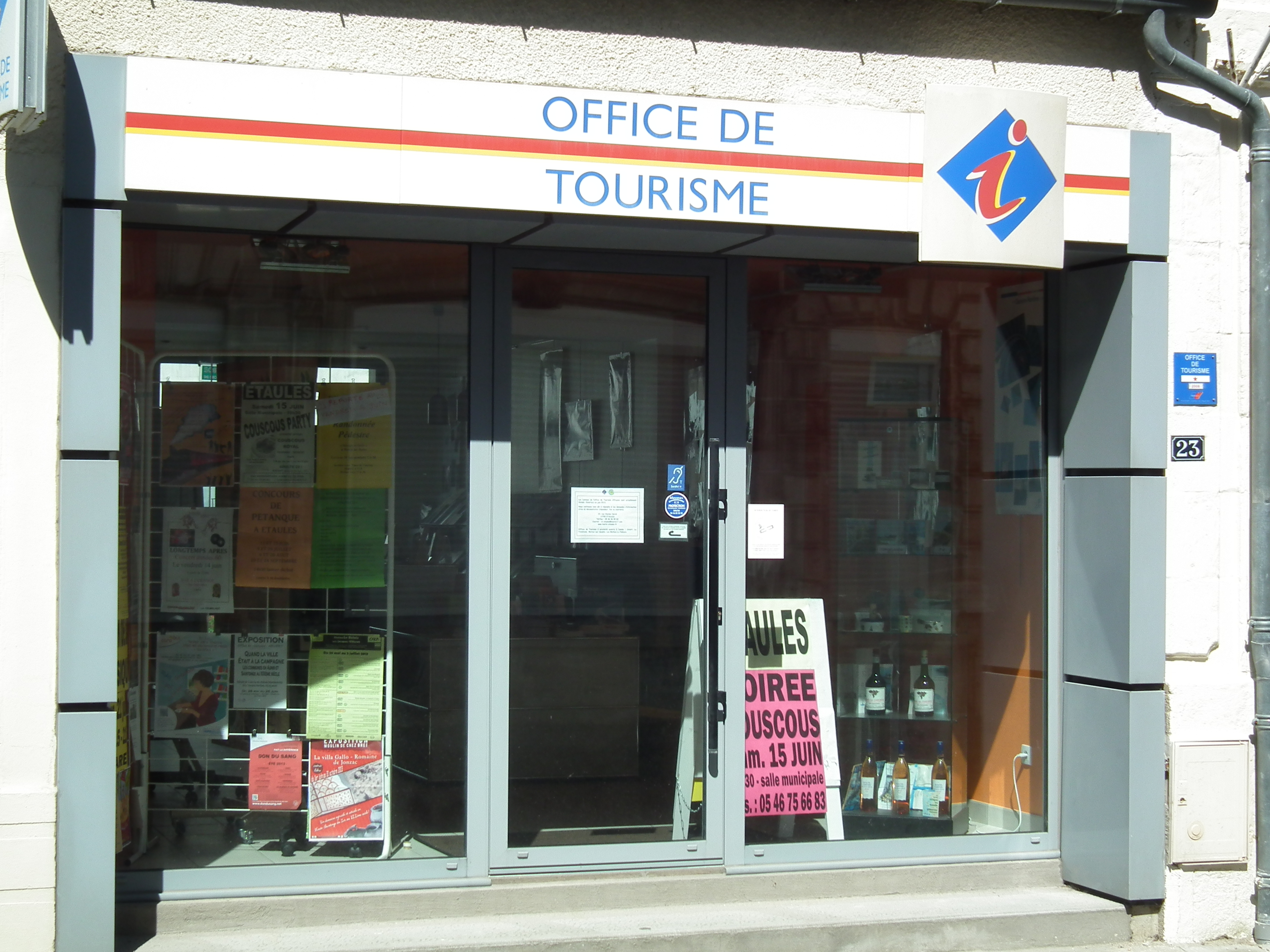 Office du tourisme d'Etaules